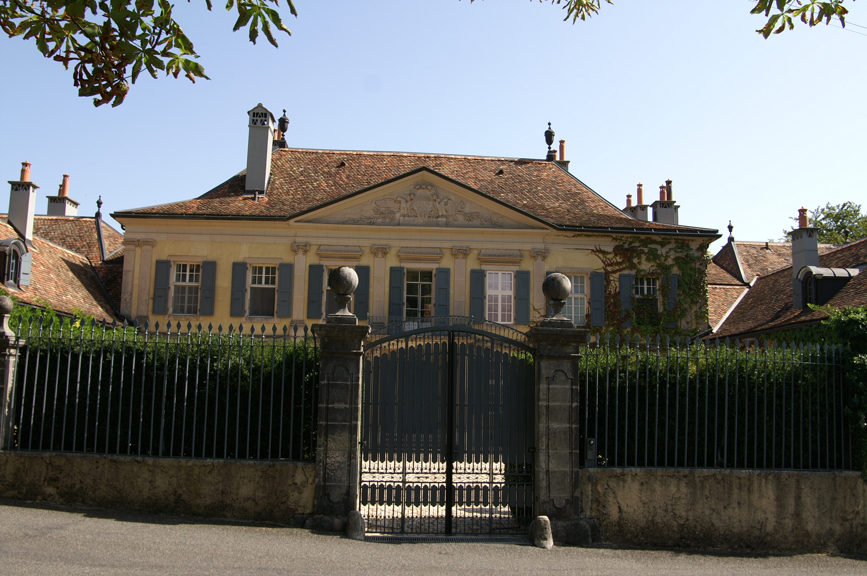 Château de Vincy à Gilly.